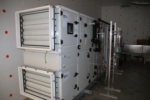 Zařízení S.A.W.E.R. (Solar Air Water Energy Resource).